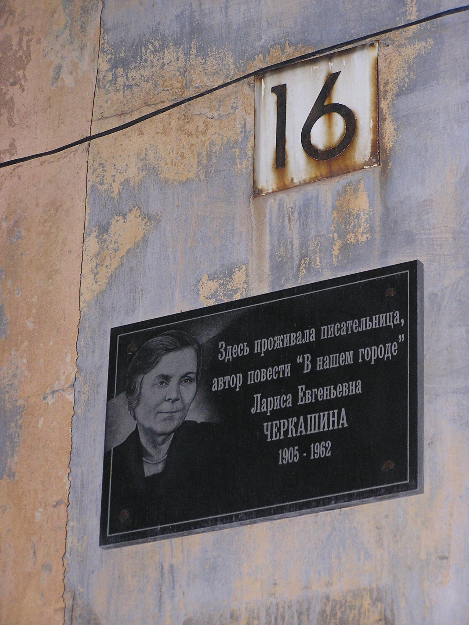 Донецк. Черкашина, Лариса Евгеньевна